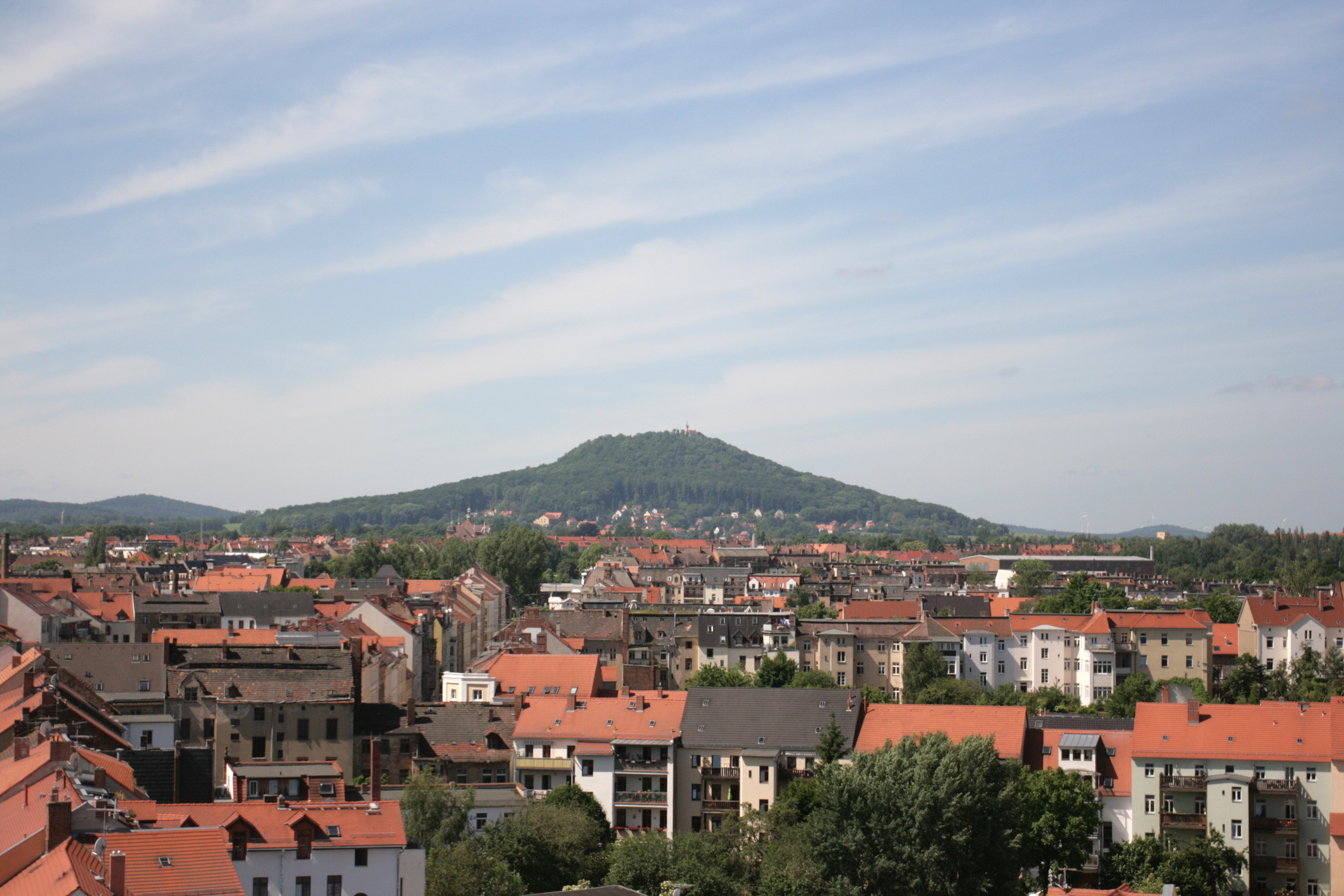 Landeskrone in Görlitz, Blick vom Reichenbacher Turm